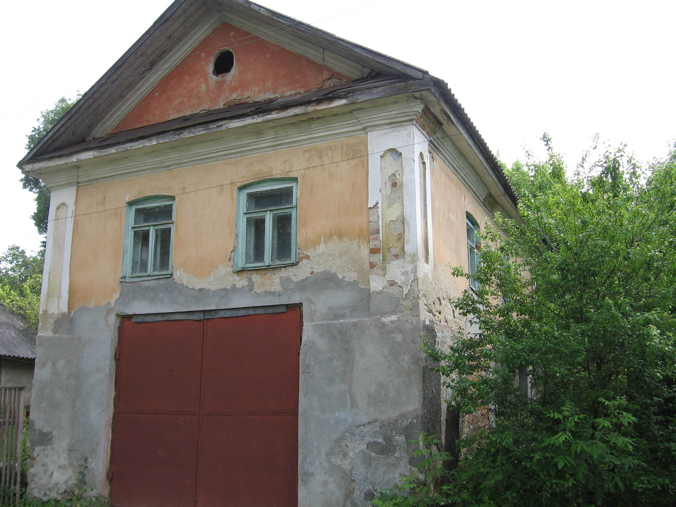 Будинок у Старому Заславі.